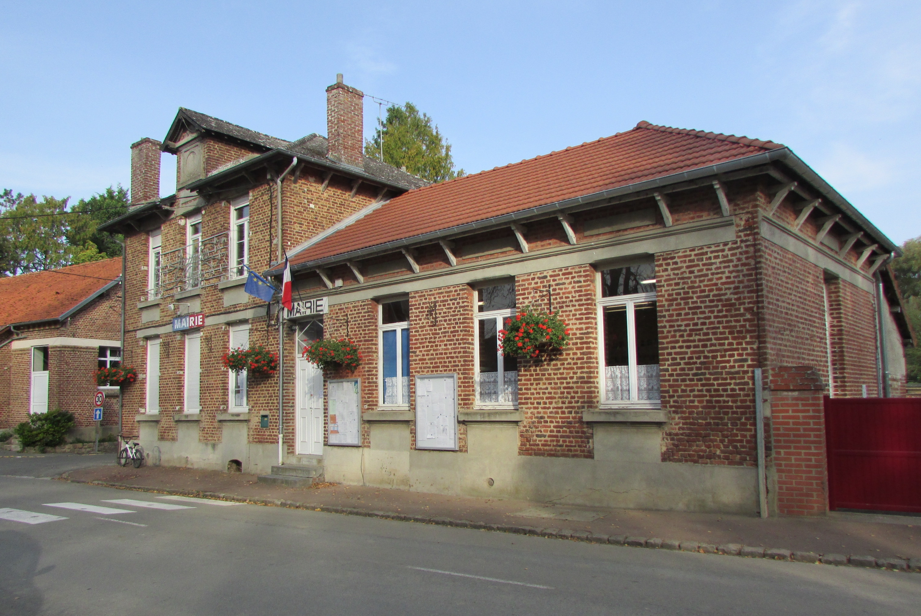 La mairie de Vadencourt (Aisne).